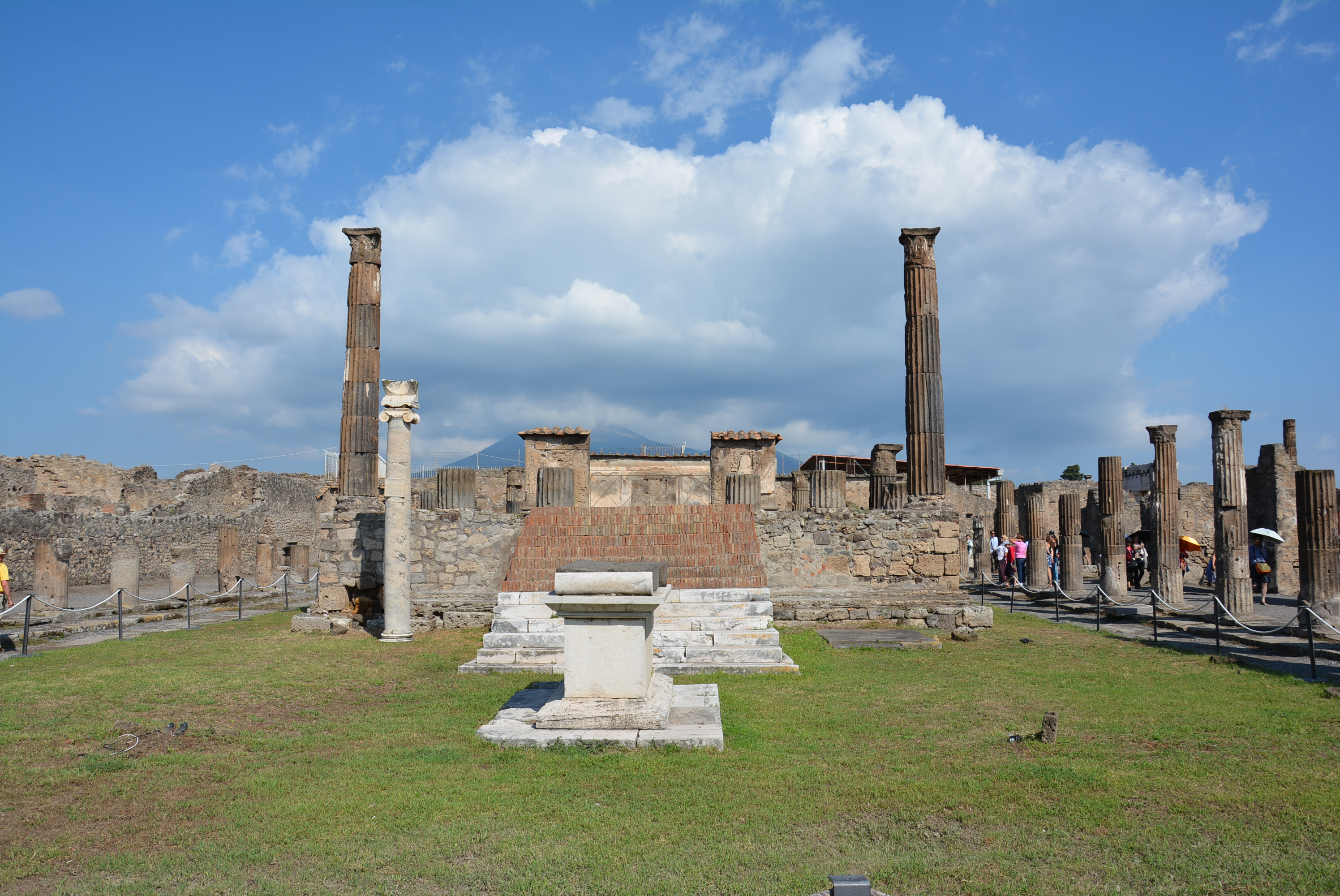 Tempio di Apollo - MIBACT This is a photo of a monument which is part of cultural heritage of Italy.